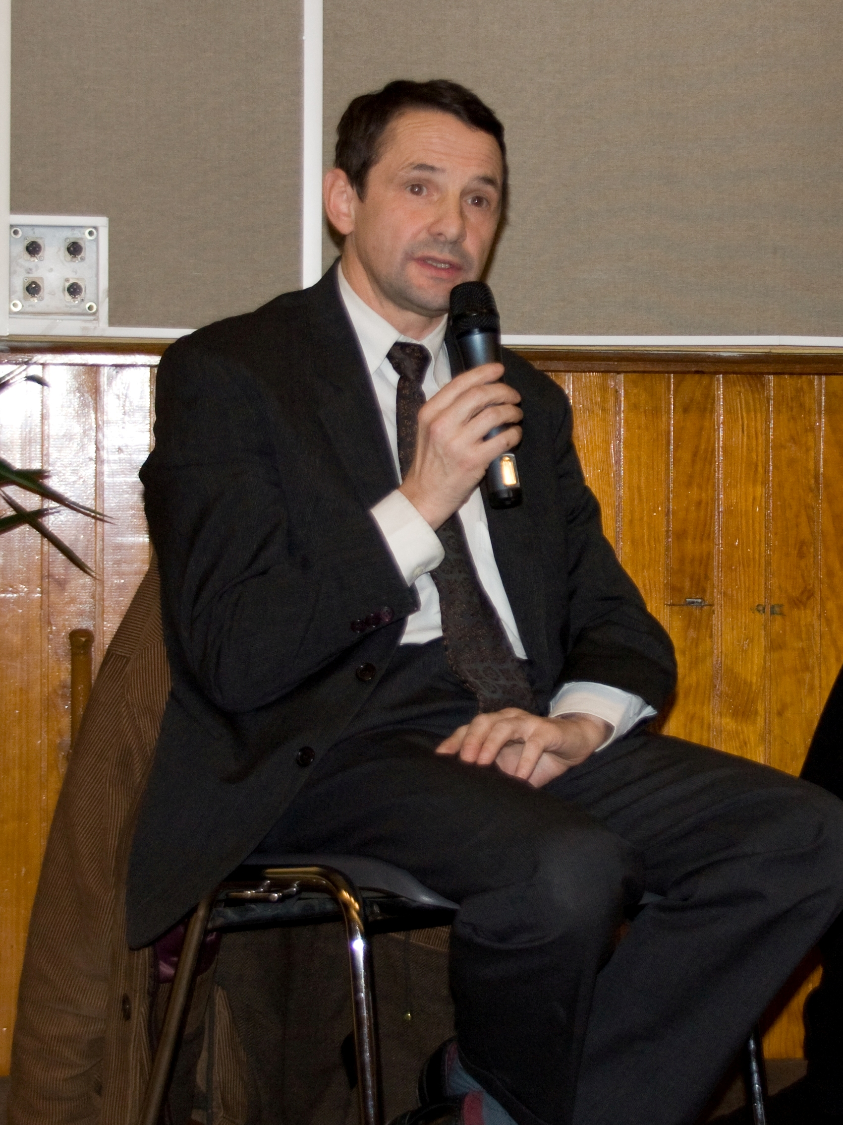 Thierry Mandon, député de l'Essonne (lors d'une réunion sur les transports à Montgeron le 5 mars 2009)